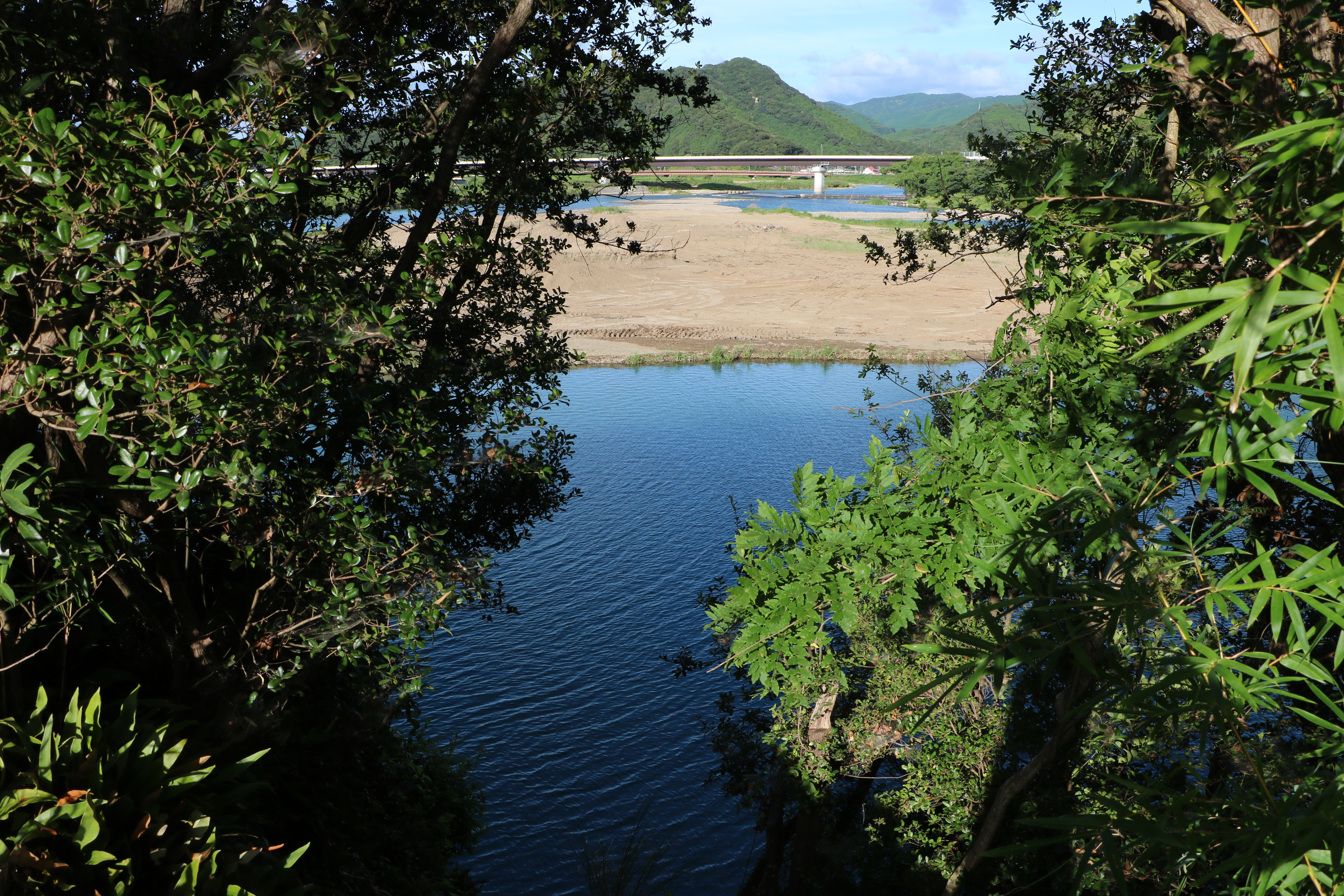 富田川のオオウナギ生息地の濁り淵（国指定天然記念物、和歌山県西牟婁郡白浜町）